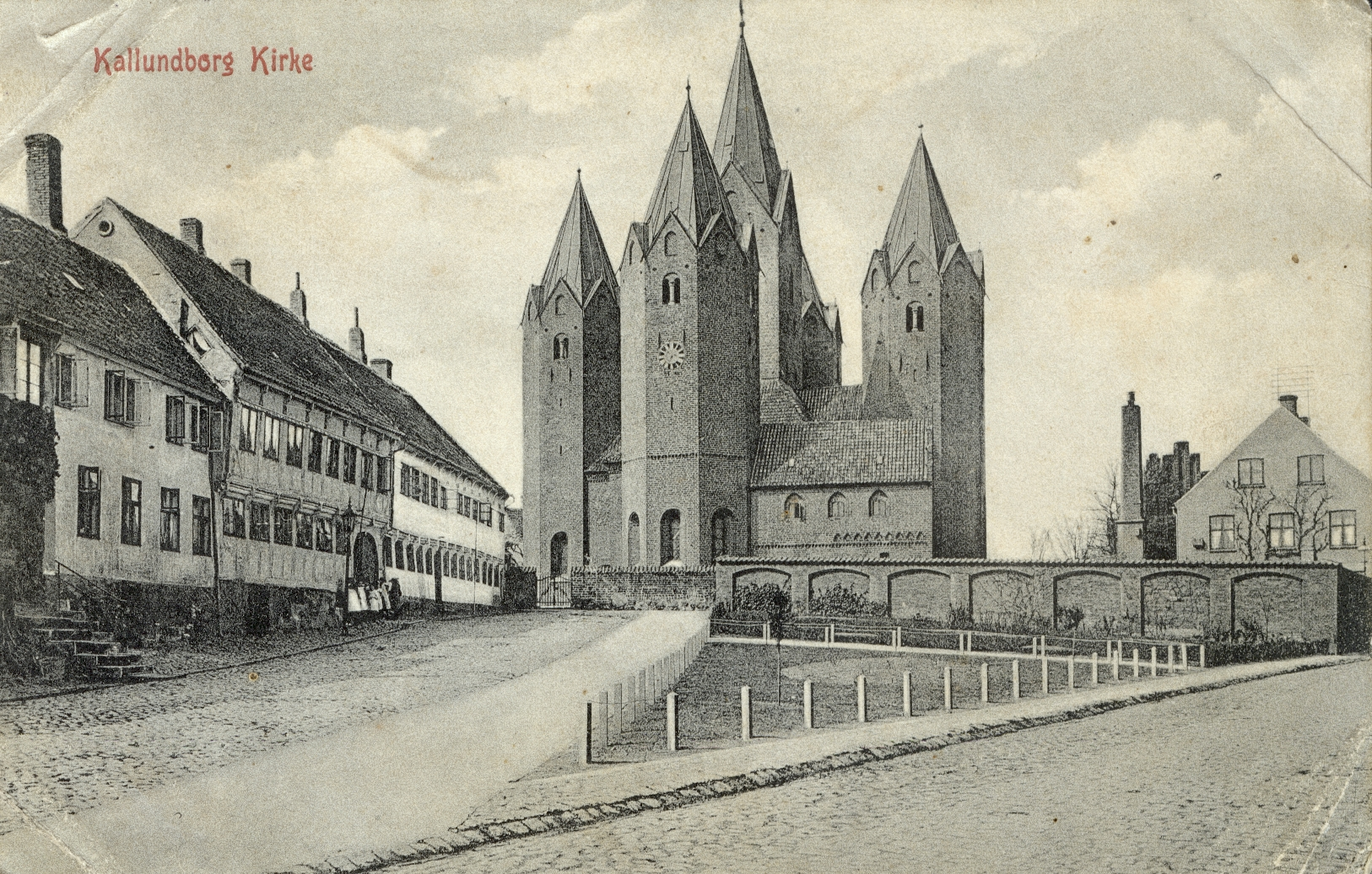 Vor Frue Kirke i Kalundborg